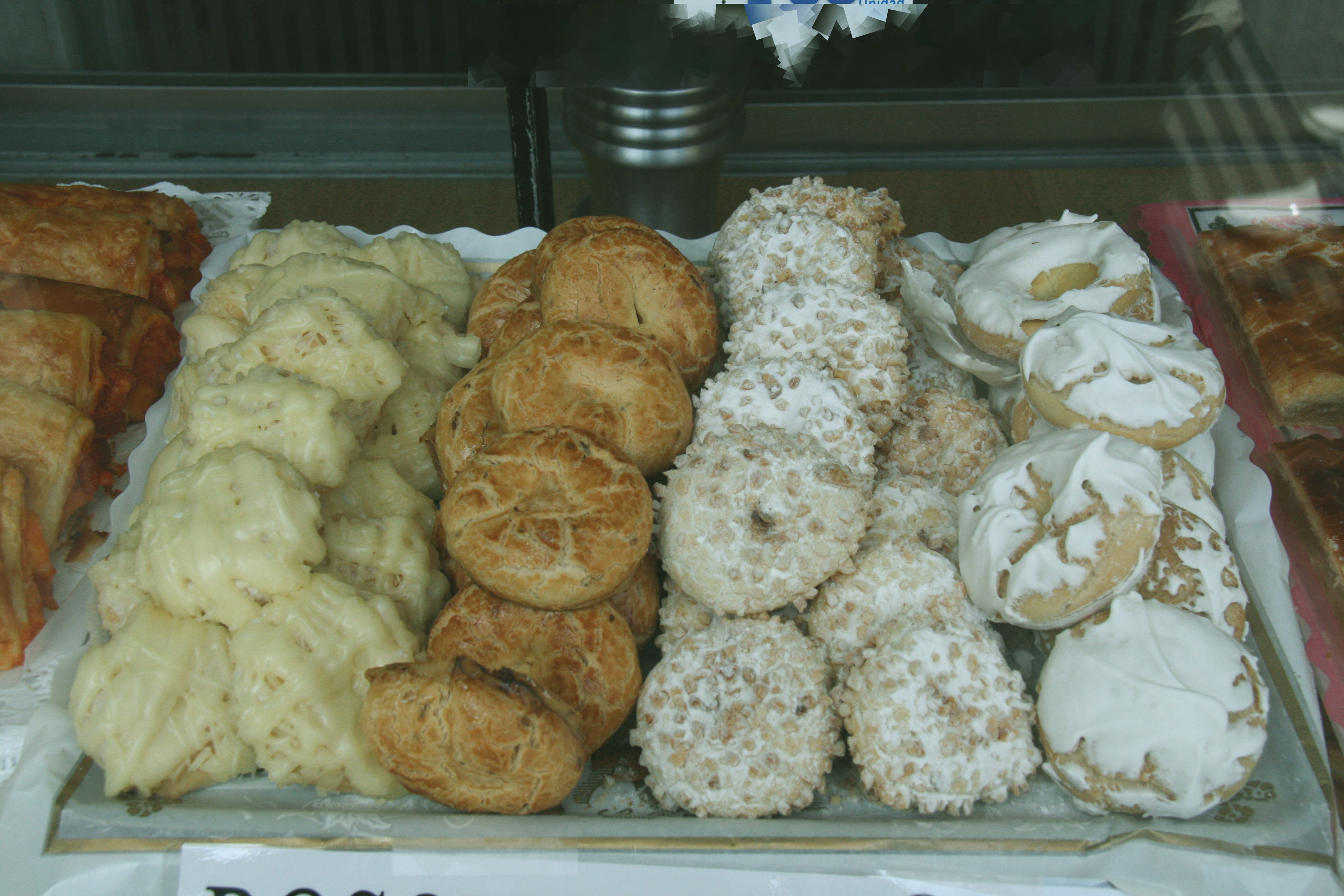 Diversas pastas de San Isidro